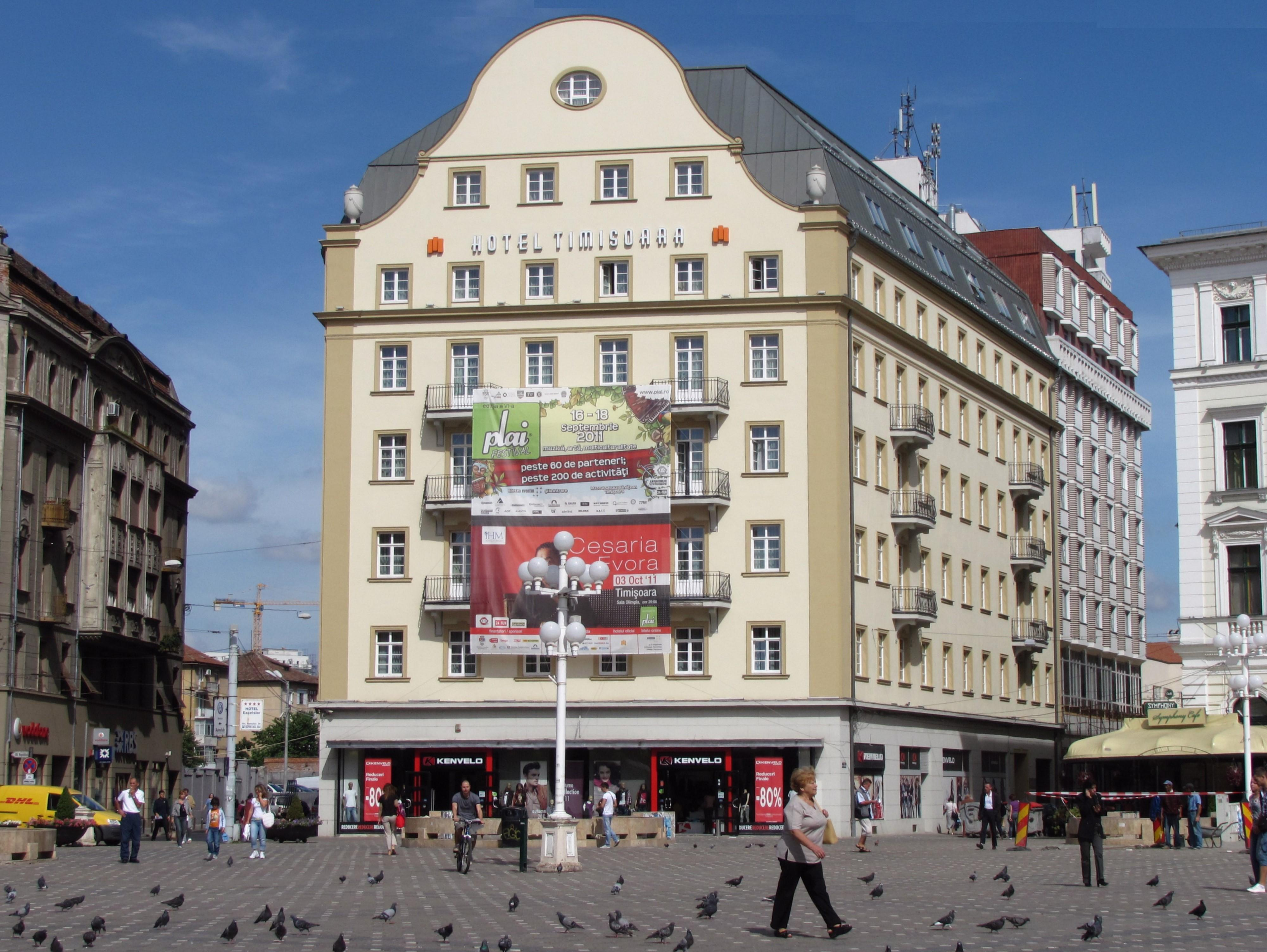 Hotel Timisoara